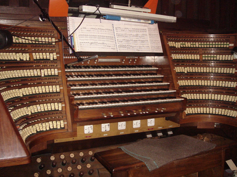 Kontuar organów w Katedrze Wrocławskiej